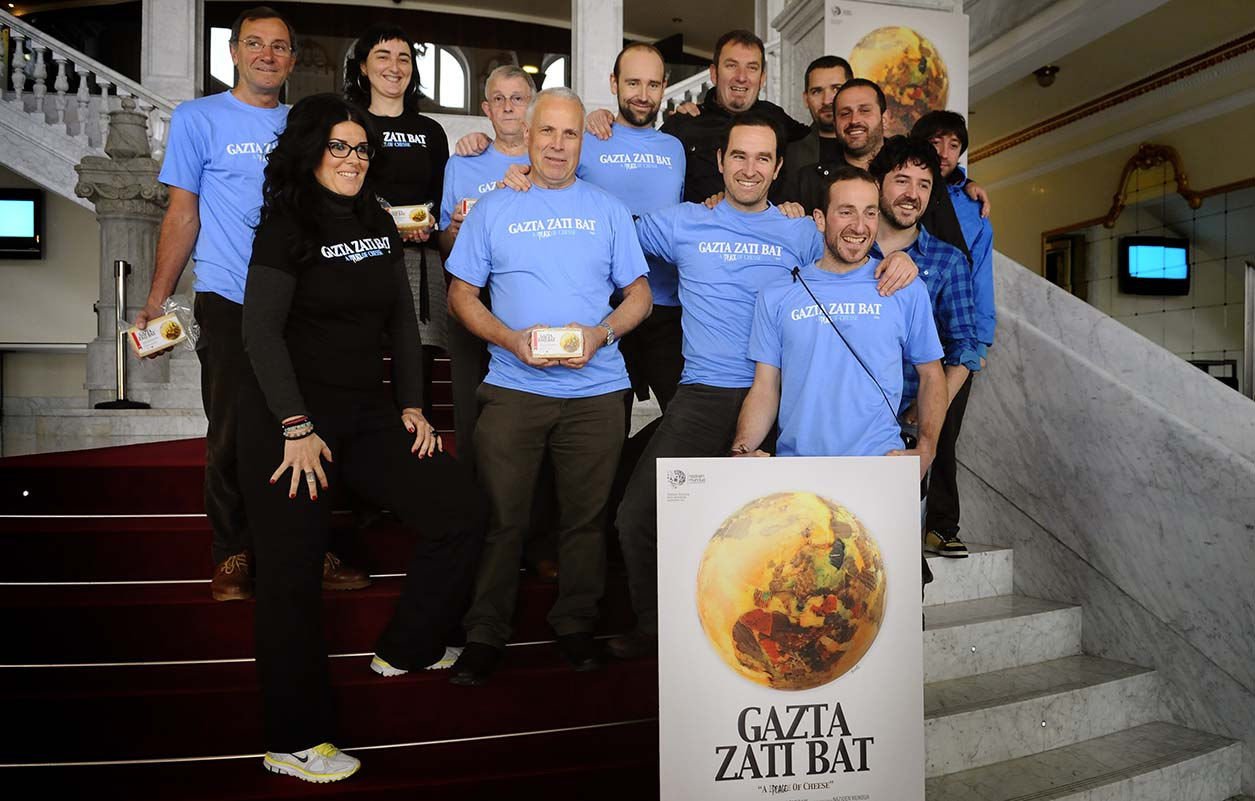 Jon Maia (director), representantes de Nazioen Mundua. Teatro Victoria Eugenia Gazta zati bat filmaren prentsaurrekoa. Jon Maia (zuzendaria), Nazioen Munduko zenbait kide. Victoria Eugenia Antzokia Argazkilaria / Fotógrafo: Iñigo Royo